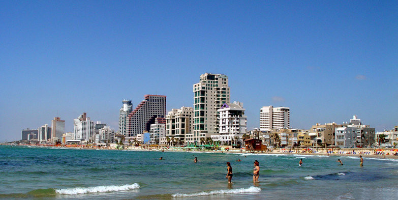 חופי ת"א, taken by --גיא חיימוביץ 05:21, 11 מרץ 2006 (UTC)